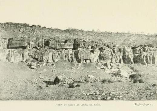 תמונות ושרטוטים מהאתר עראק אל אמיר שצילם או שרטט קלוד קונדר בסקר ארץ ישראל המזרחית בשנת 1881. צילום של המצוק